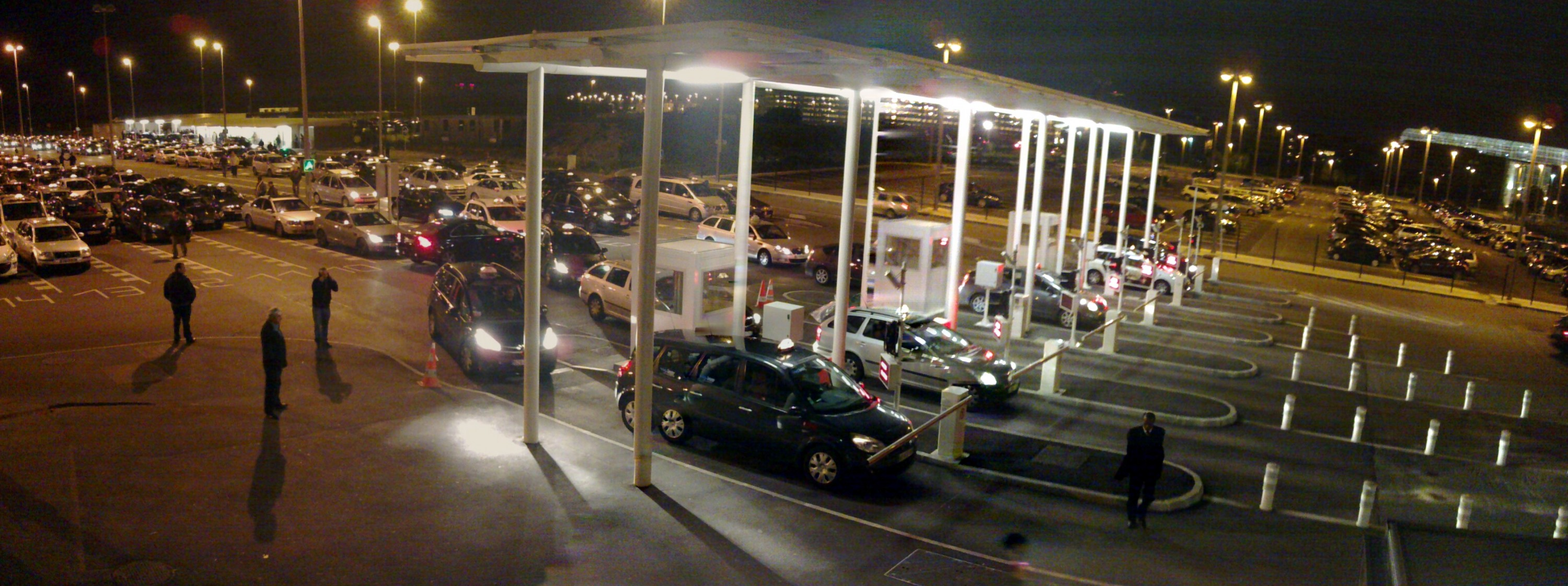 Photo panoramique de la base arrière d'attente des taxis parisiens de l'aéroport Paris-Charles-de-Gaulle.